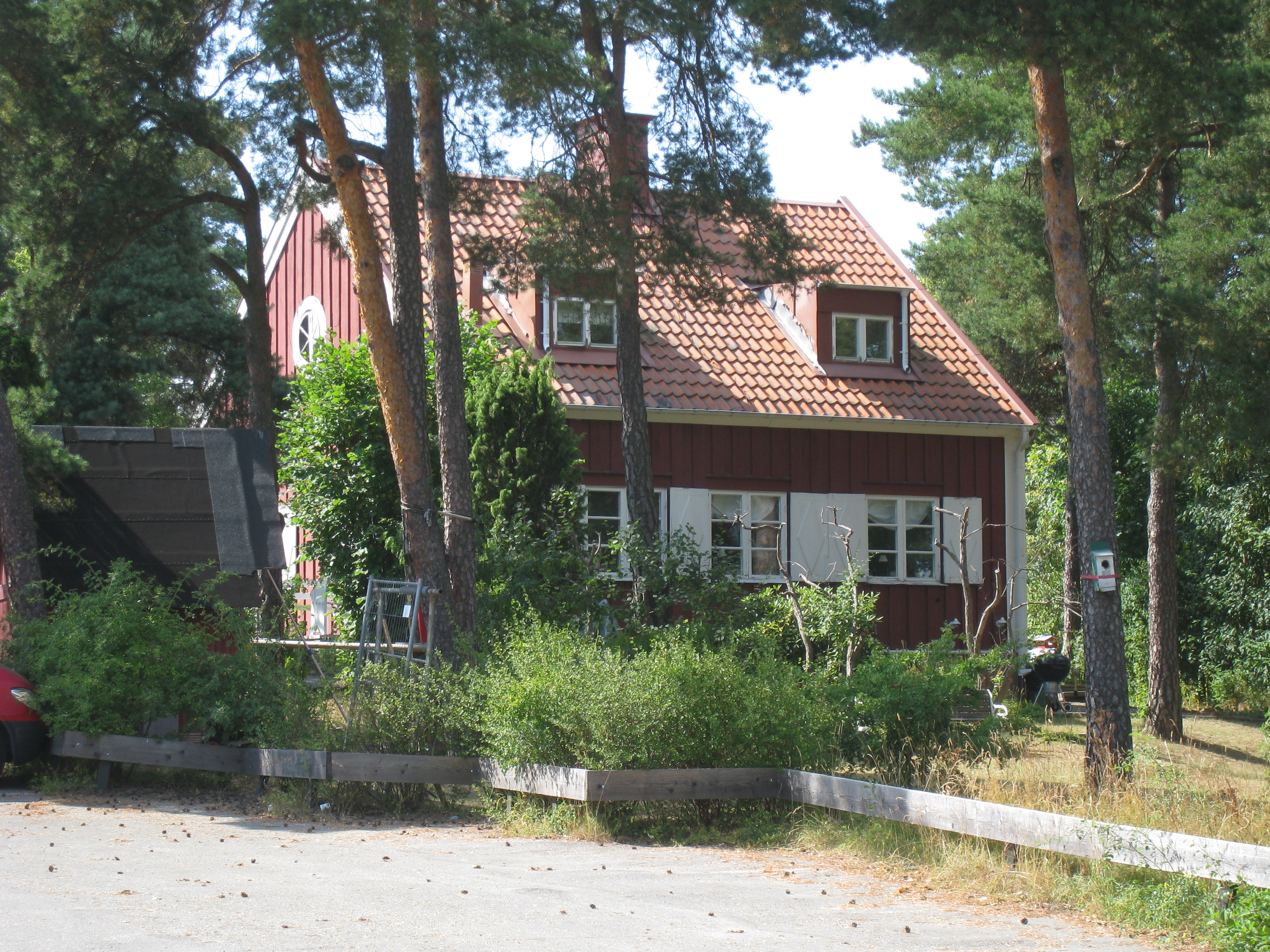 Äppelviksskolan, Alviksvägen 97, Bromma. Vaktmästarbostaden.